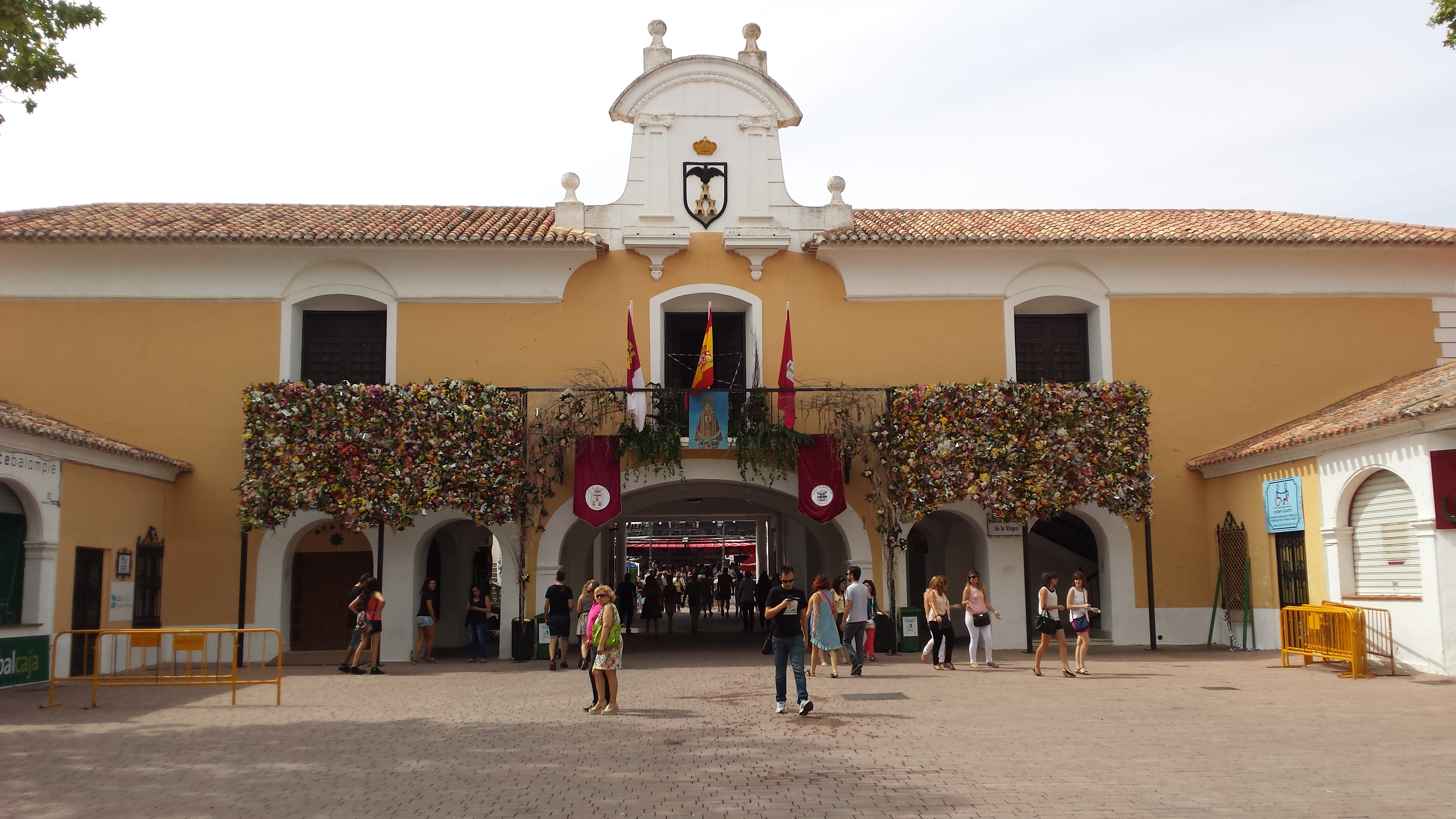 Capilla de la Virgen de Los Llanos del Recinto Ferial de Albacete con las flores de la Ofrenda de flores a la Virgen de Los Llanos. Albacete